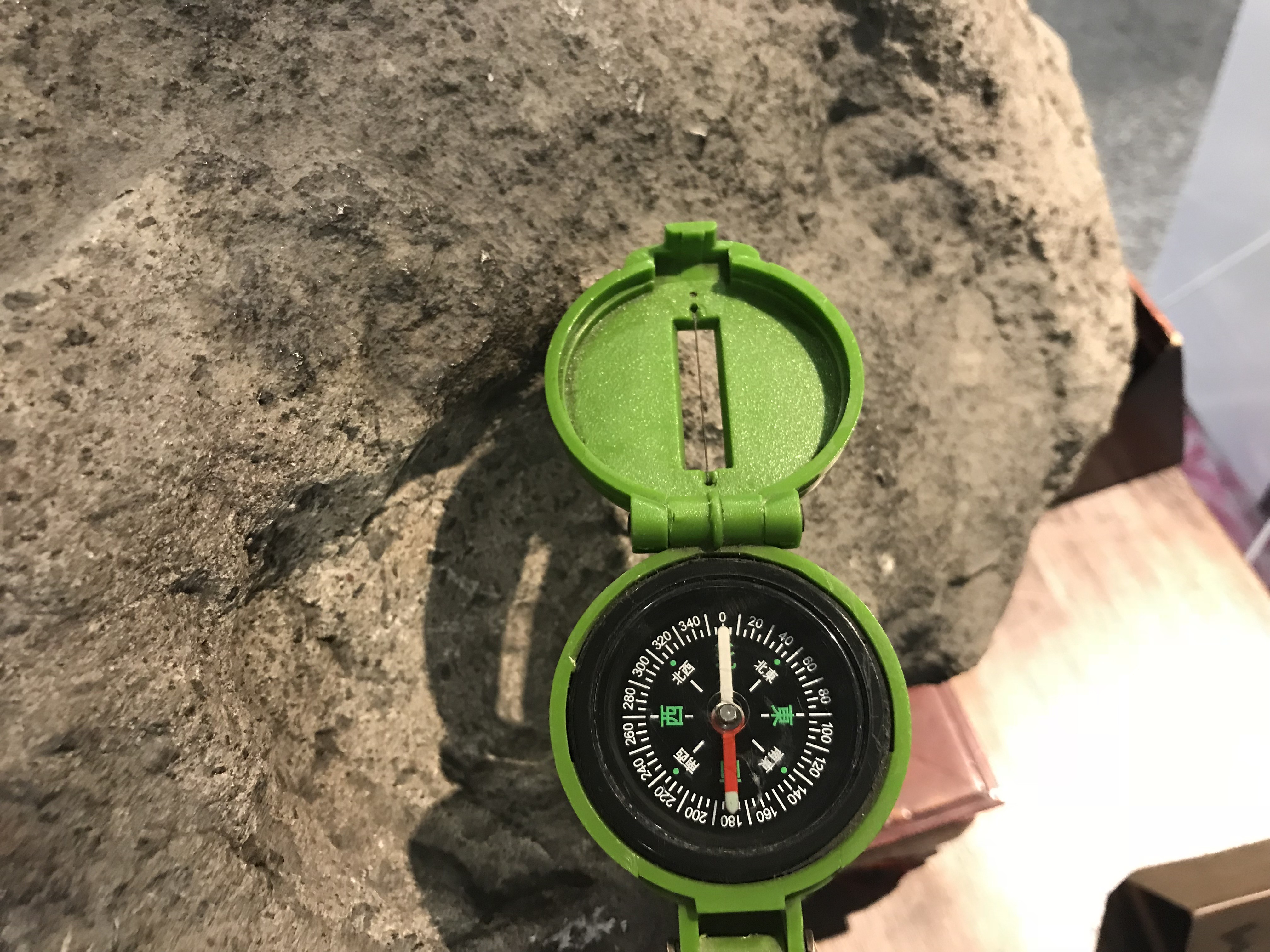 中文（台灣）: 放在永福磁石上而狀態相反的指北針。